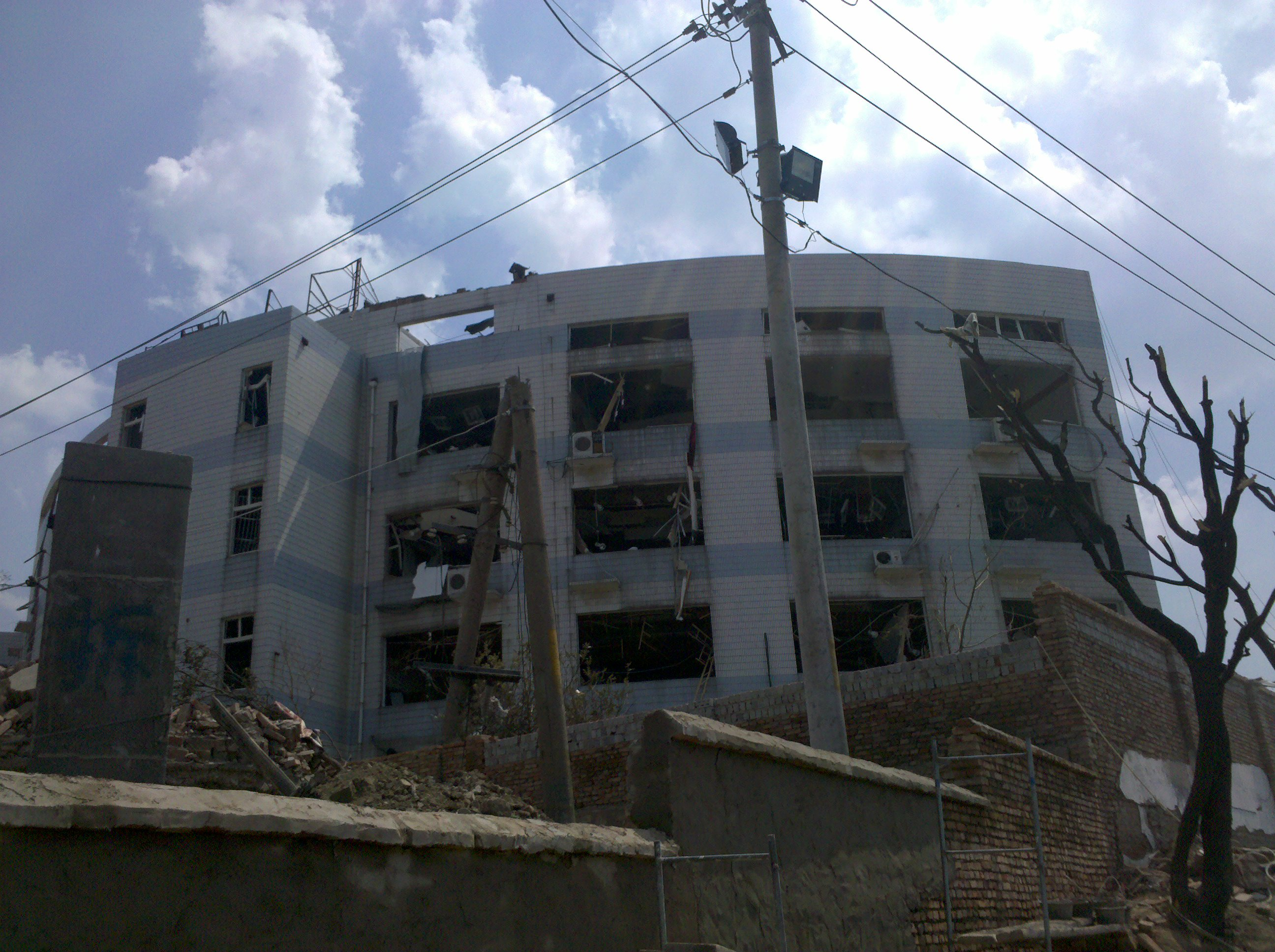 建筑受损